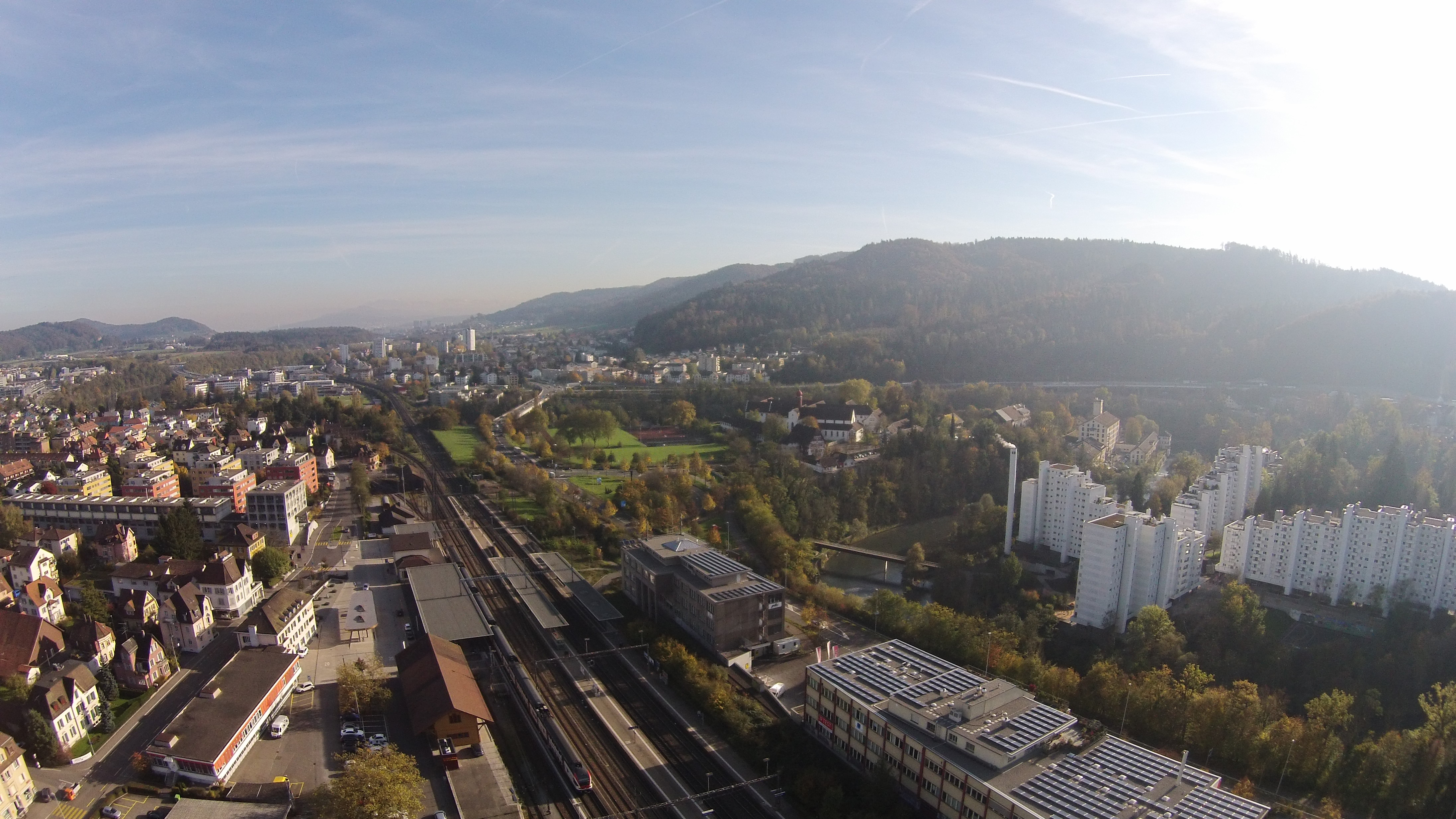 Luftbild mit Blick auf den Bahnhof Wettingen, das Kloster und das Limmattal Richutng Neuenhof